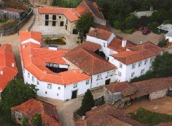 Casa São Miguel - Turismo Rural e Eventos - Gondomar: Vista área da aldeia